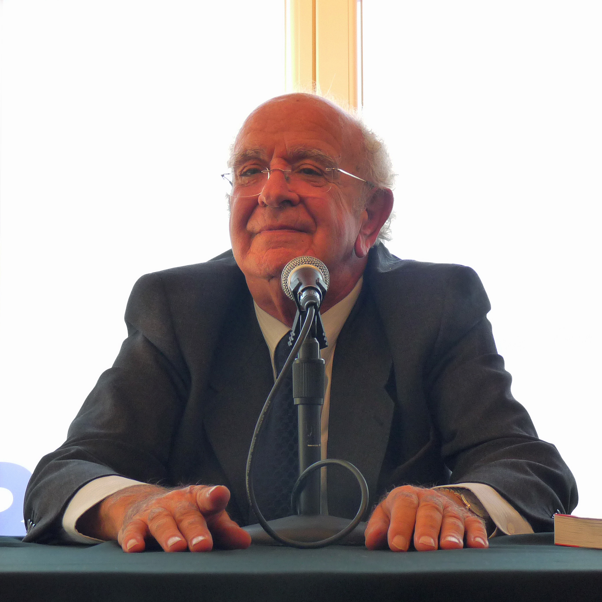 Le pédiatre Aldo Naouri présentant son dernier ouvrage dans une librairie strasbourgeoise.